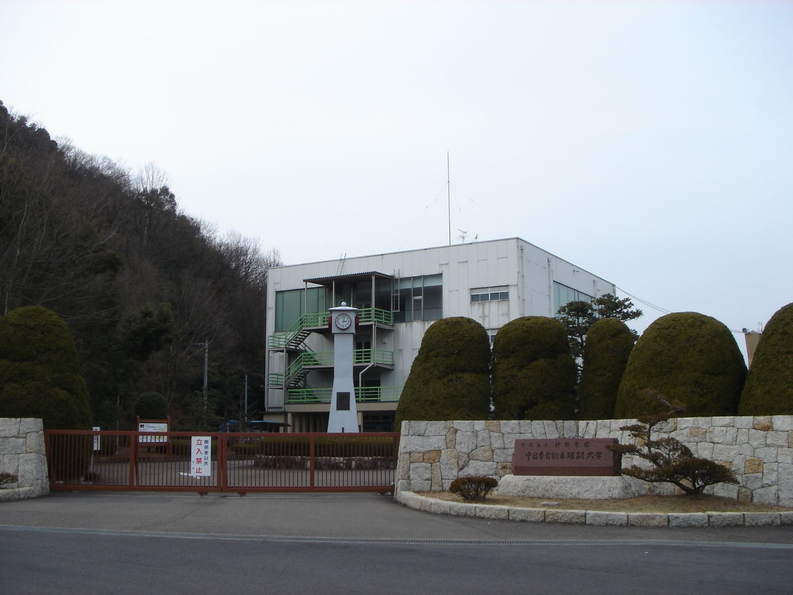 Nakanihon Automotive College(中日本自動車短期大学),Sakahogi,Gifu,Japan(岐阜県坂祝町)で撮影。